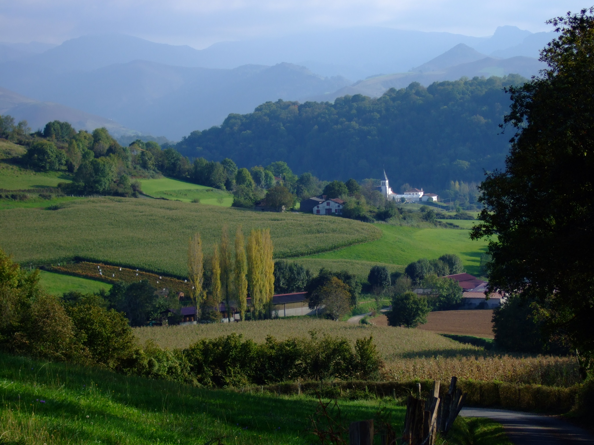 Arrivée sur Bussunarits, par le GR 65